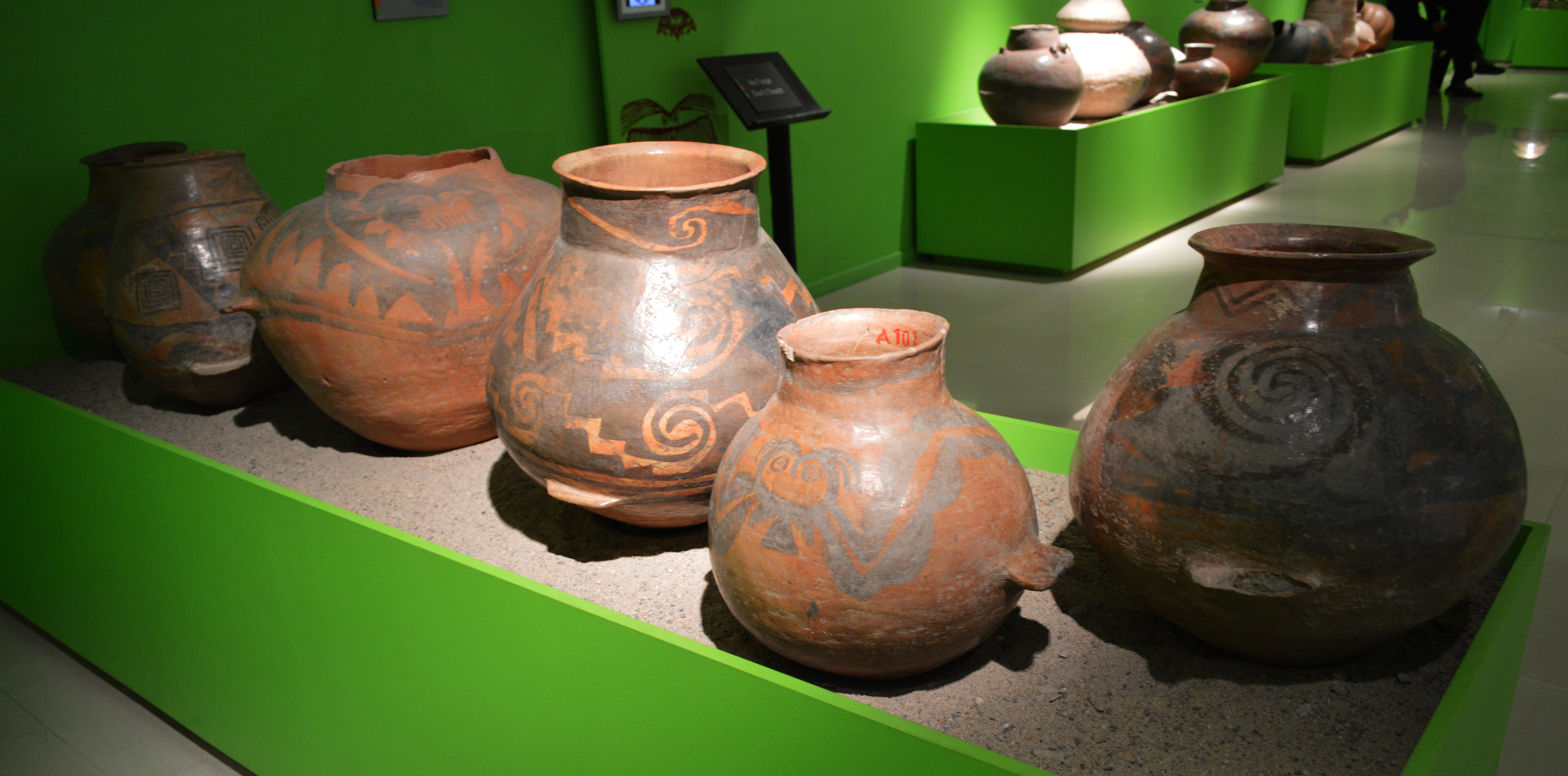 Alfarería indígena